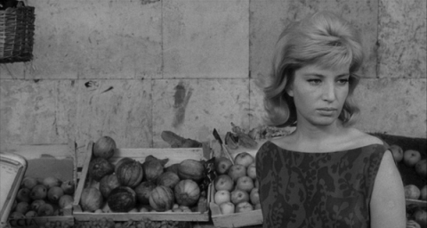 Képkocka „A napfogyatkozás” című filmből